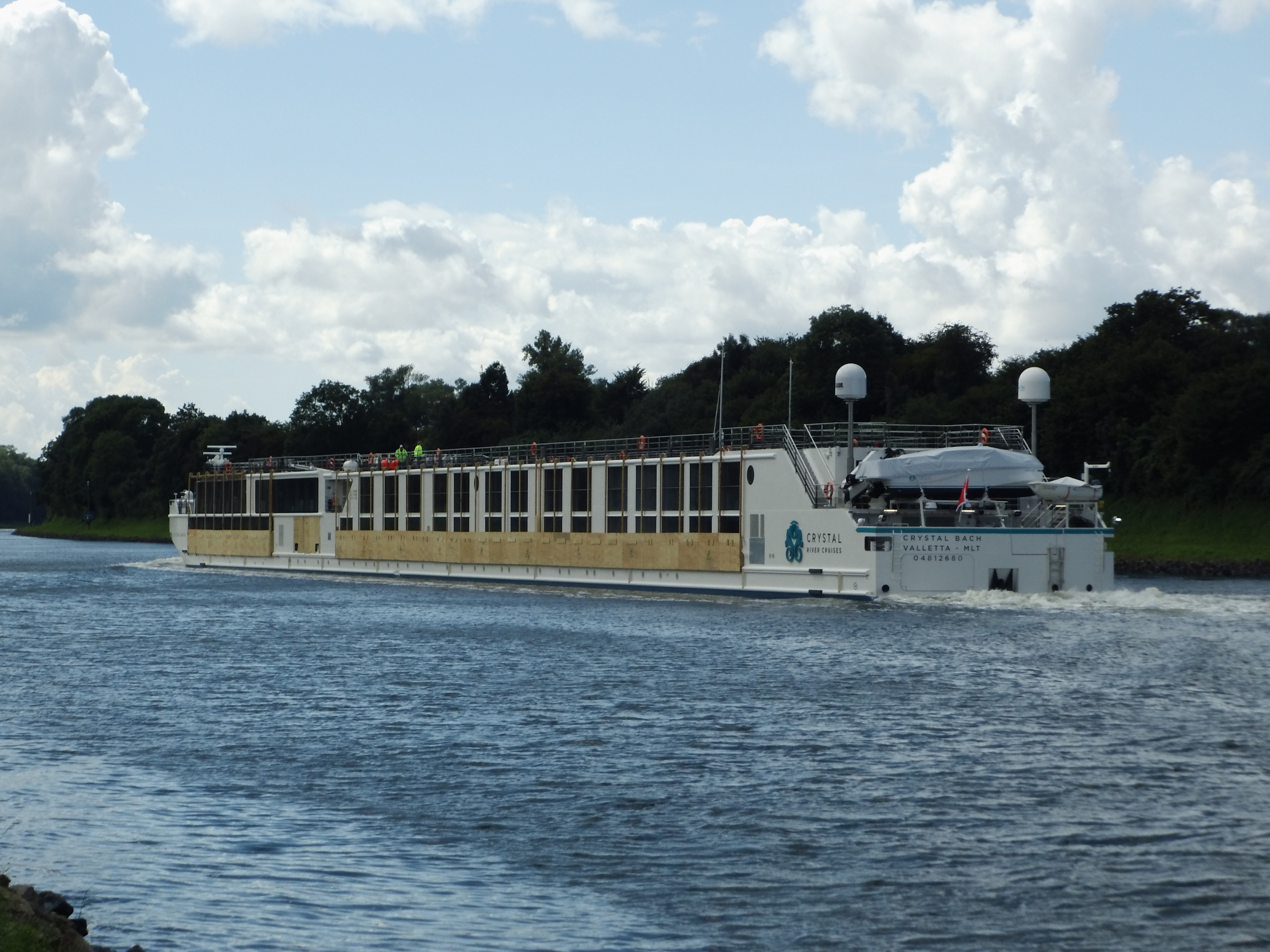 Crystal Bach in Kiel Canal.